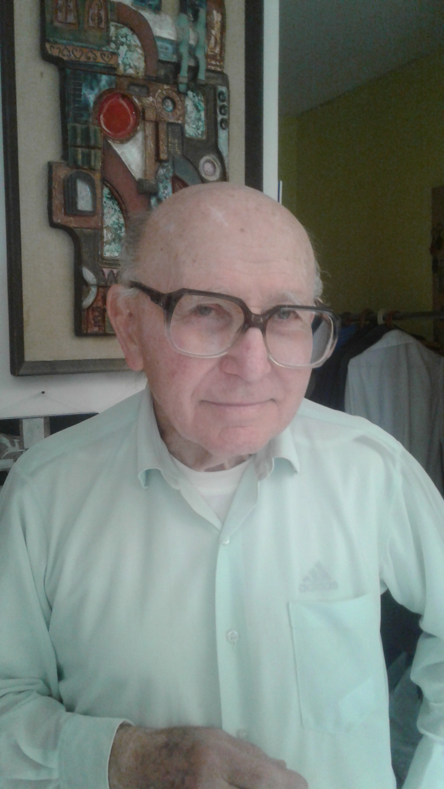 שאול לדני, אפריל 2910